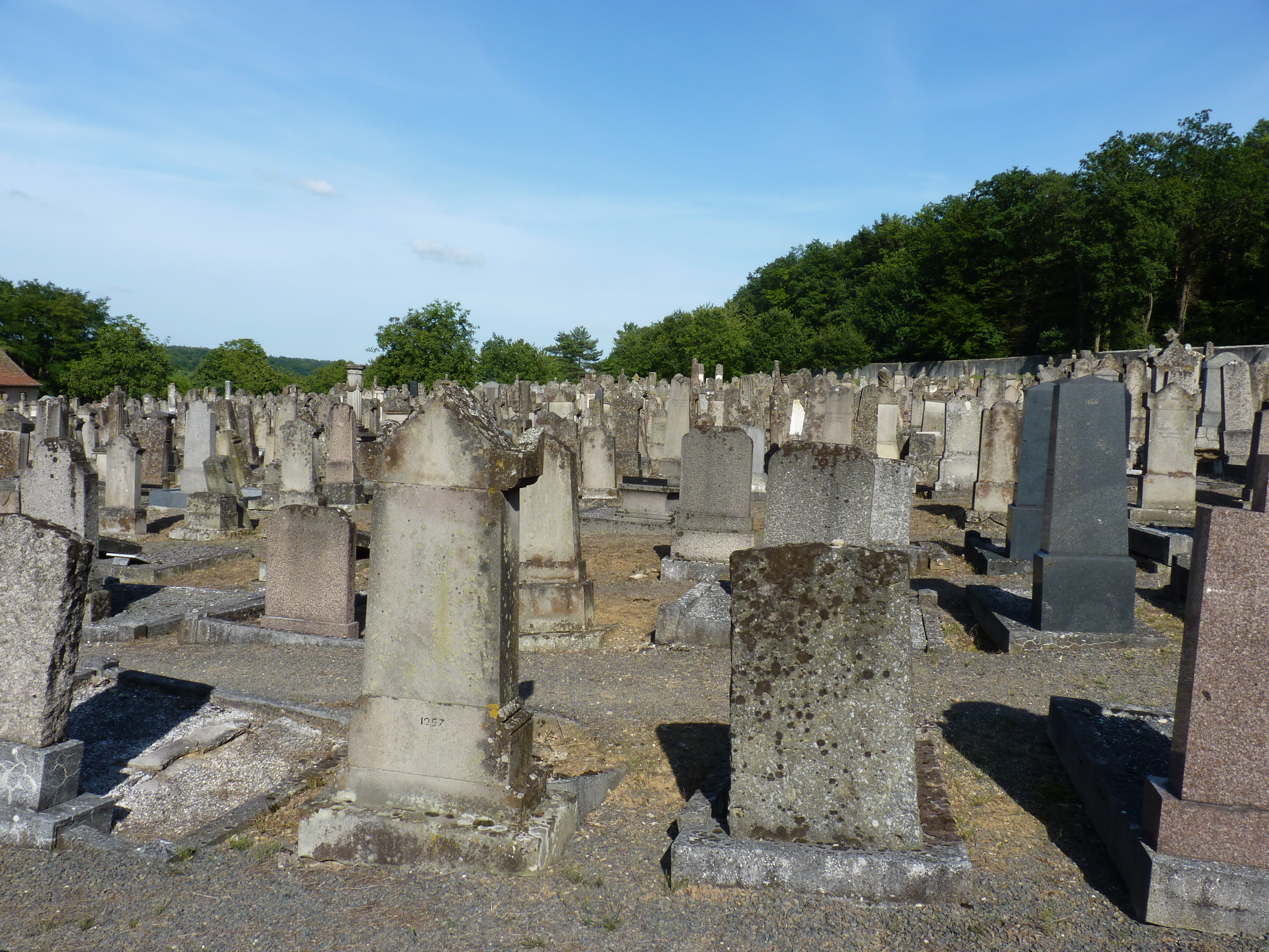 Cimetière israélite de Rosenwiller